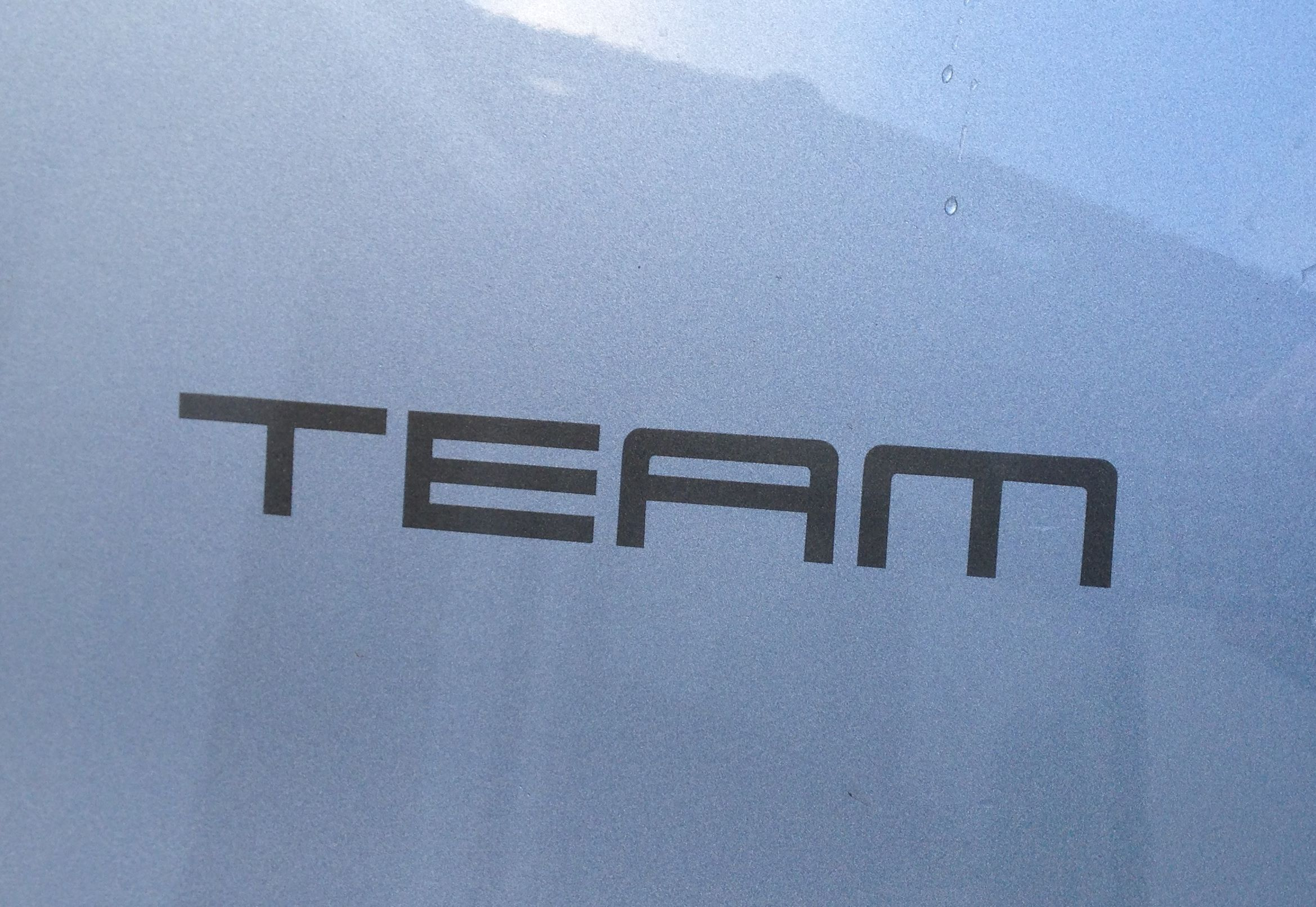 Volkswagen Golf Plus - Sondermodell "TEAM" - Schriftzug an der C-Säule